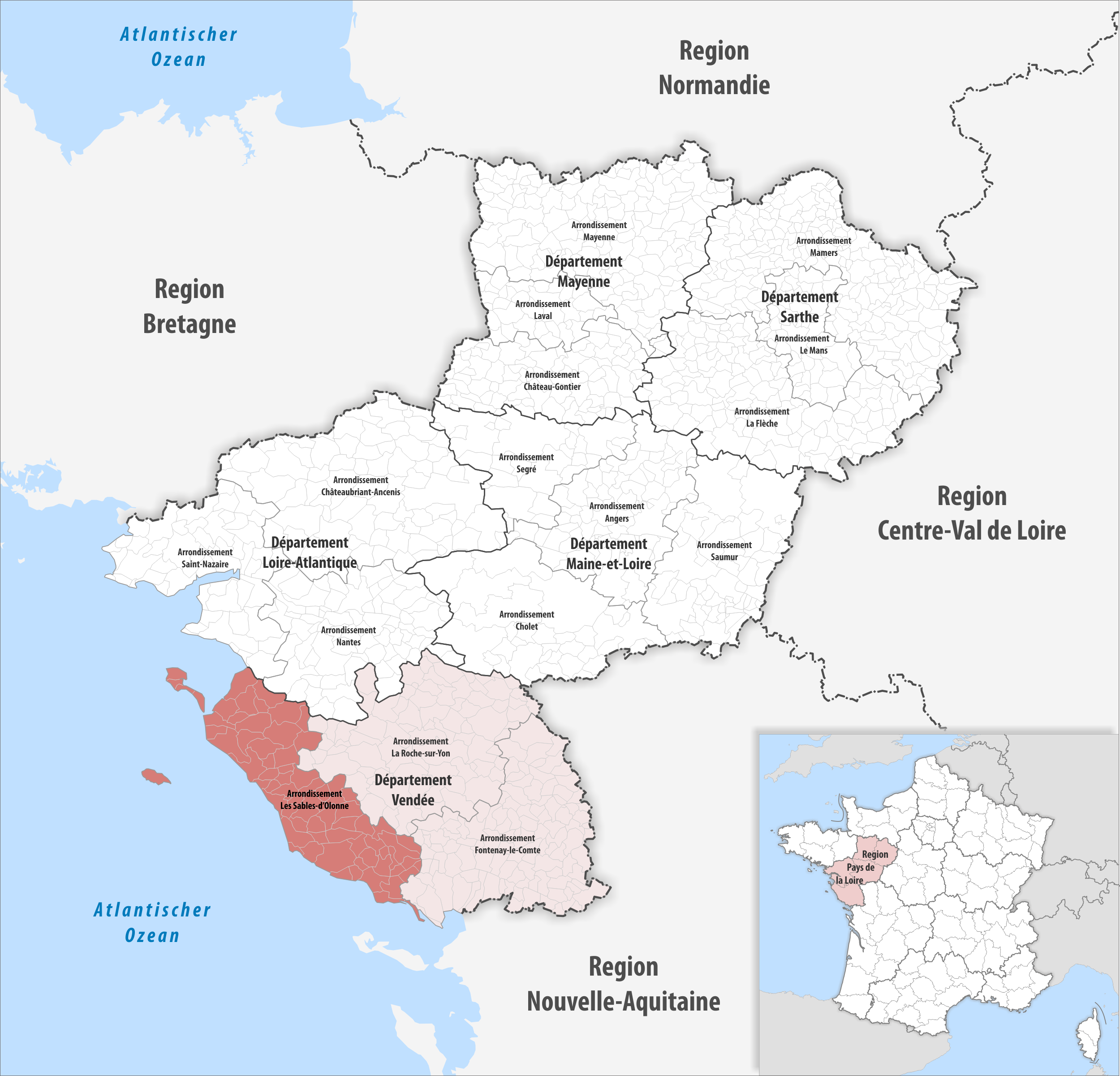 Lage des Arrondissements Les Sables-d’Olonne